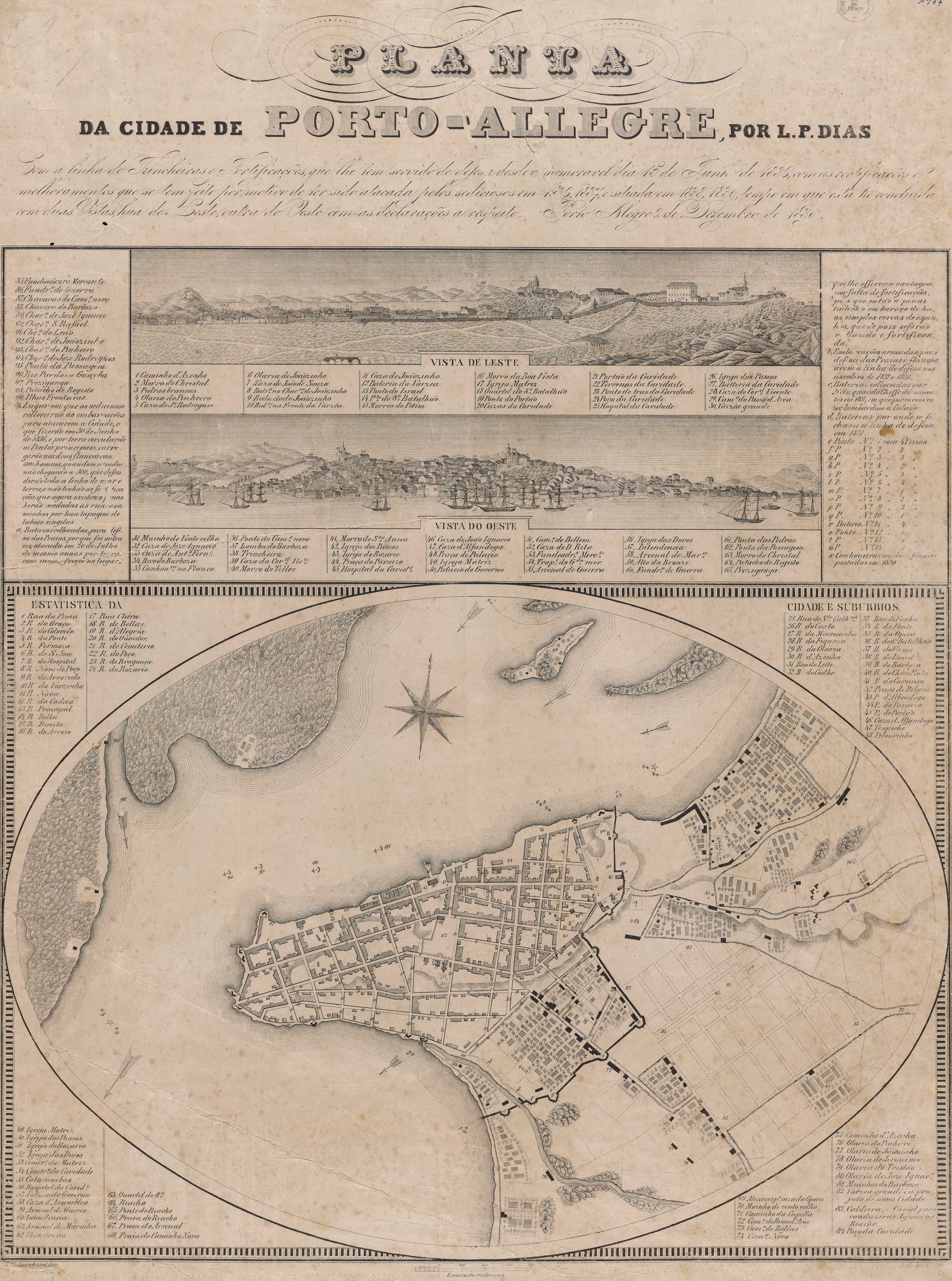 "Planta da cidade de Porto-Allegre [Cartográfico] : com a linha de trincheiras e fortificações que lhe tem servido de defesa desde o memoravel dia 15 de junho de 1836, com as... / por L. P. Dias.